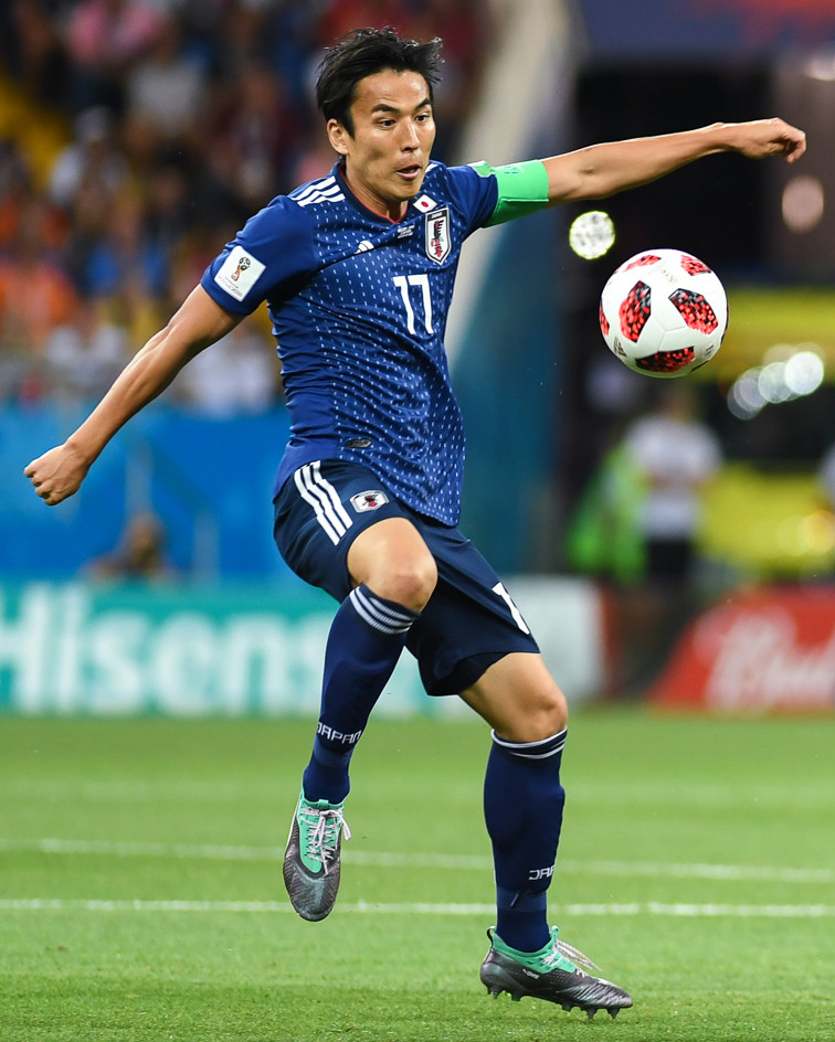 Потрясающий камбэк сборной Бельгии в матче с Японией